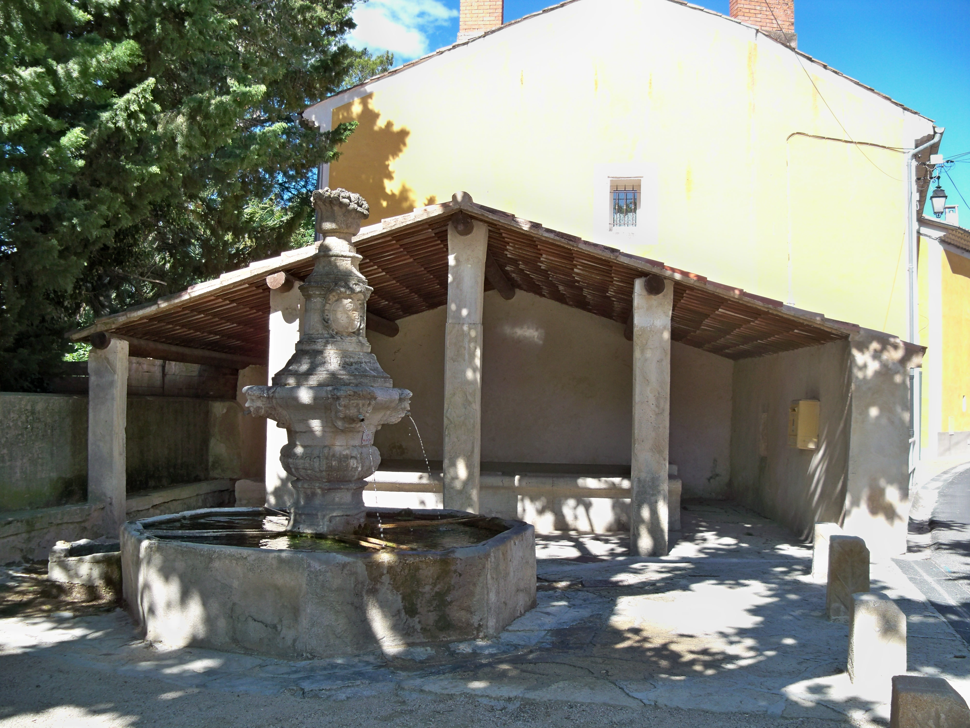 Lavoir et fontaine à Modène, Vaucluse